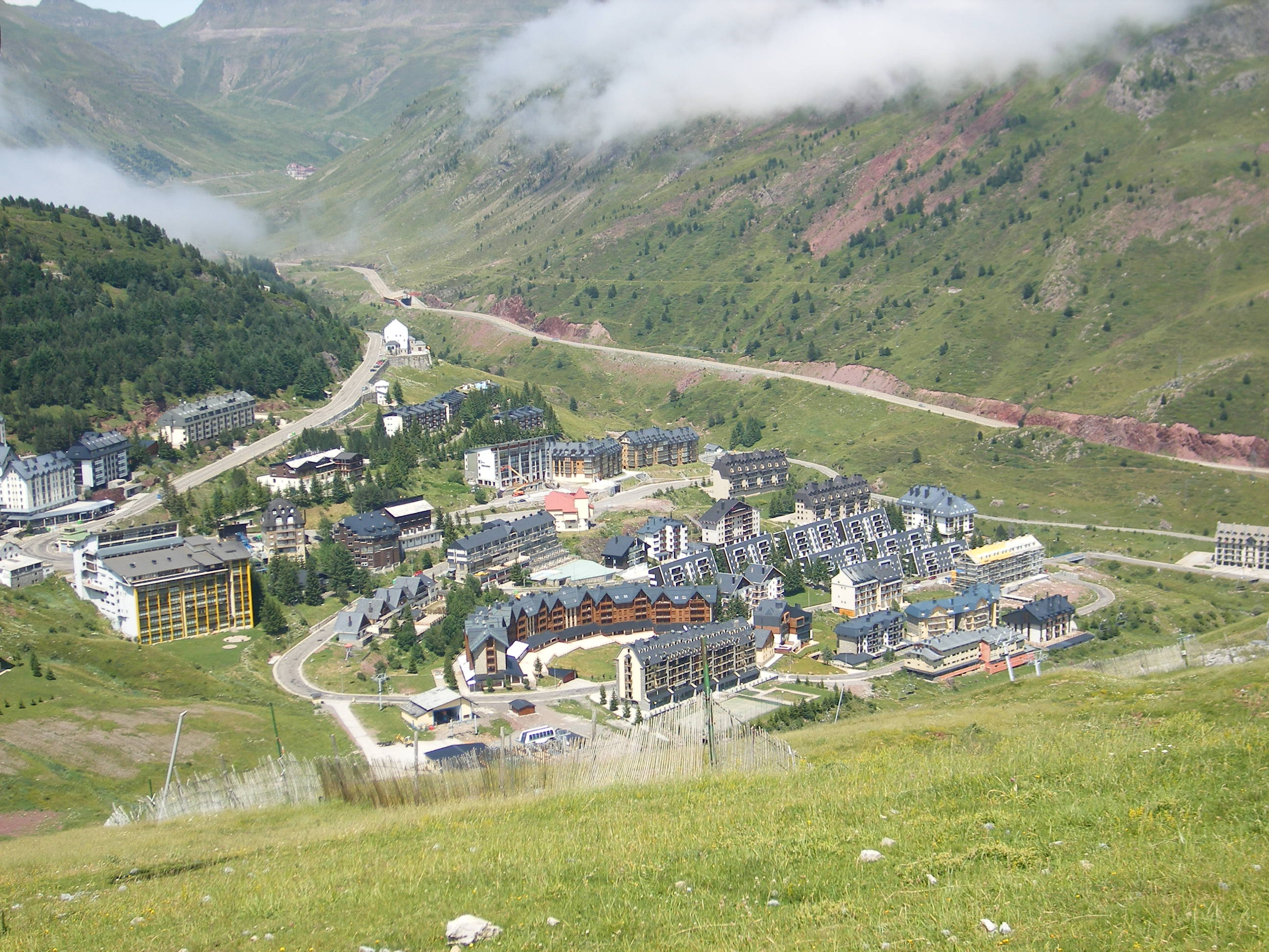 Aragonés: Ambista de Candanchú dend'o Tobazo, en estiu.